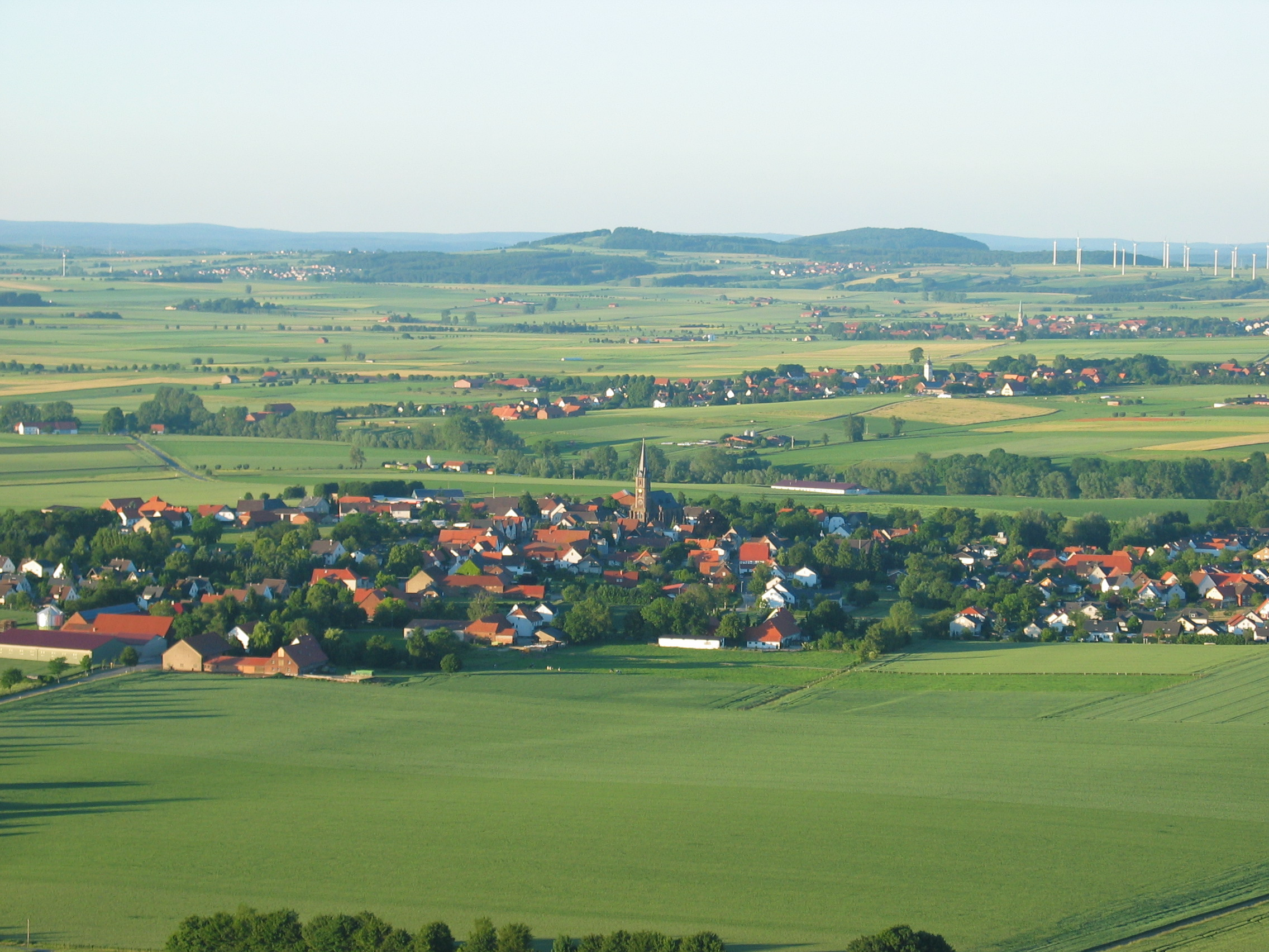 Sicht auf die Warburger Börde von der Ruine Desenberg aus. Dörfer (von vorne nach hinten): Daseburg, Rösebeck, Körbecke